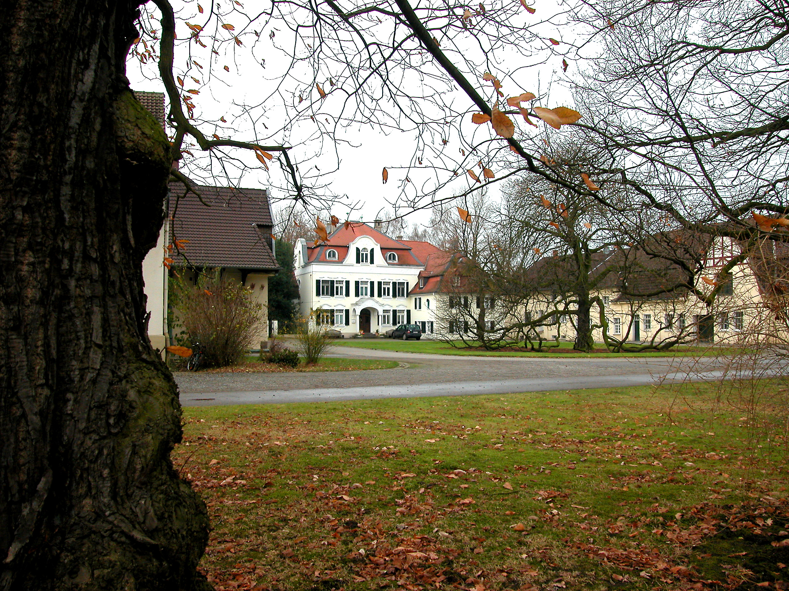 Hof Schulz Gahmen. Luenen (de); Усадьба Шульц-Гамен в пределах Люнена (ru).